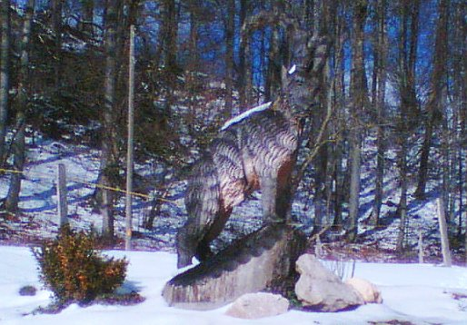 Miriam Cahn, Brutalitätenskulptur, 2007/08 - in der Stiftung sculpture at schoenthal, Schönthal bei Langenbruck, Schweiz